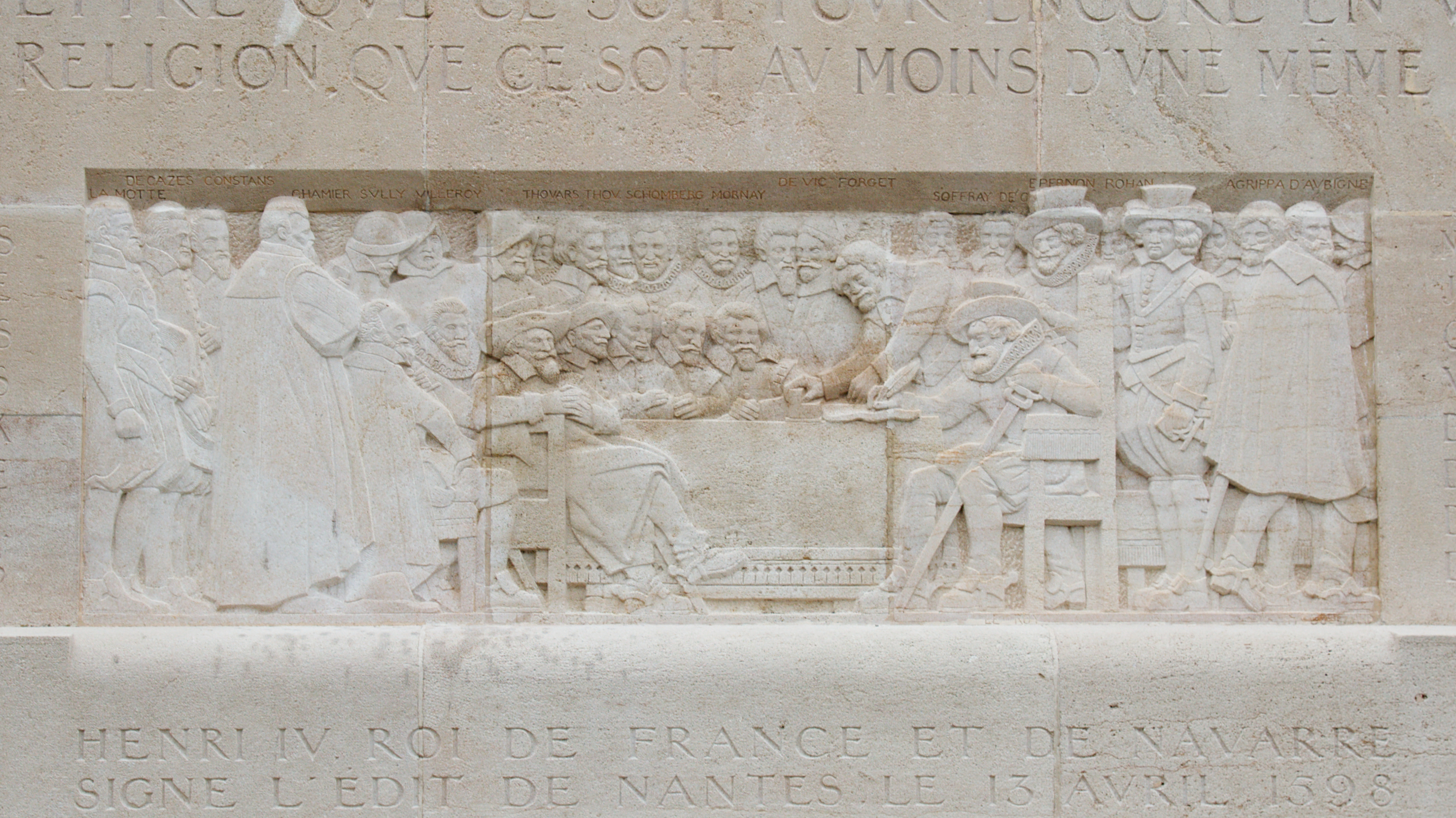 Bas-relief représentant la signature de l'Édit de Nantes par Henri IV en 1598 (la date indiquée est erronée, l'Édit ayant été signé à une date postérieure, vraisemblablement le 30 avril)